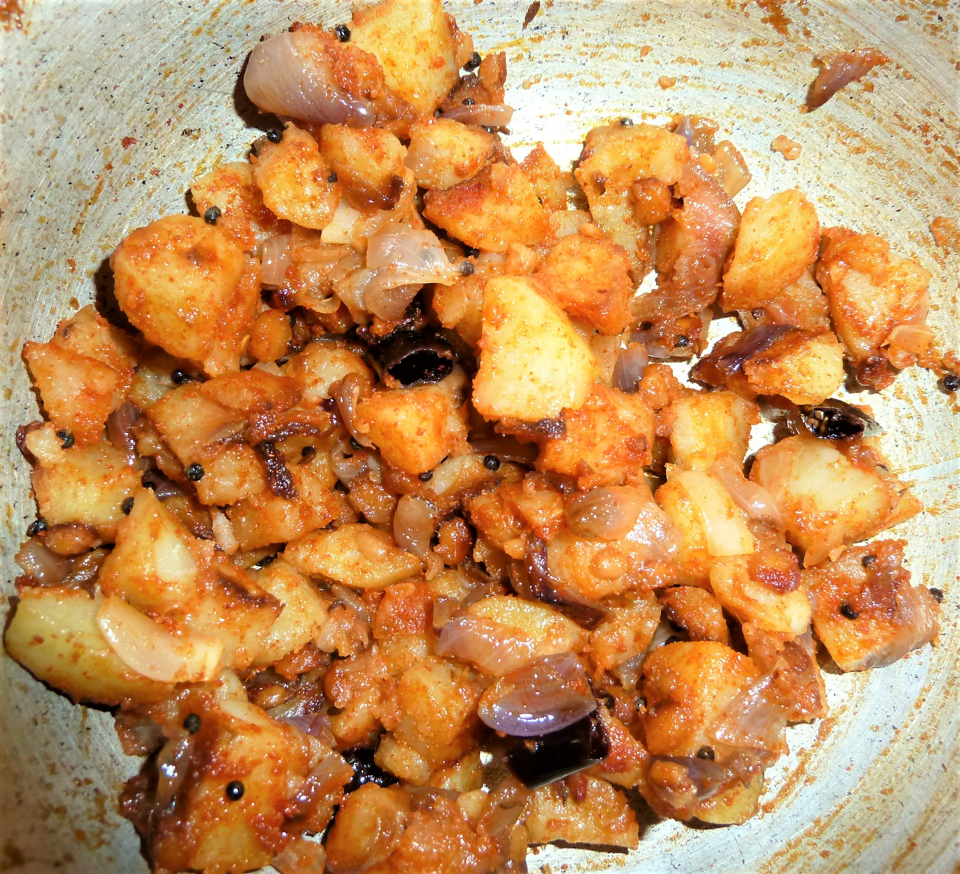 అరటికాయ ఉల్లిపాయ పోపు కూర